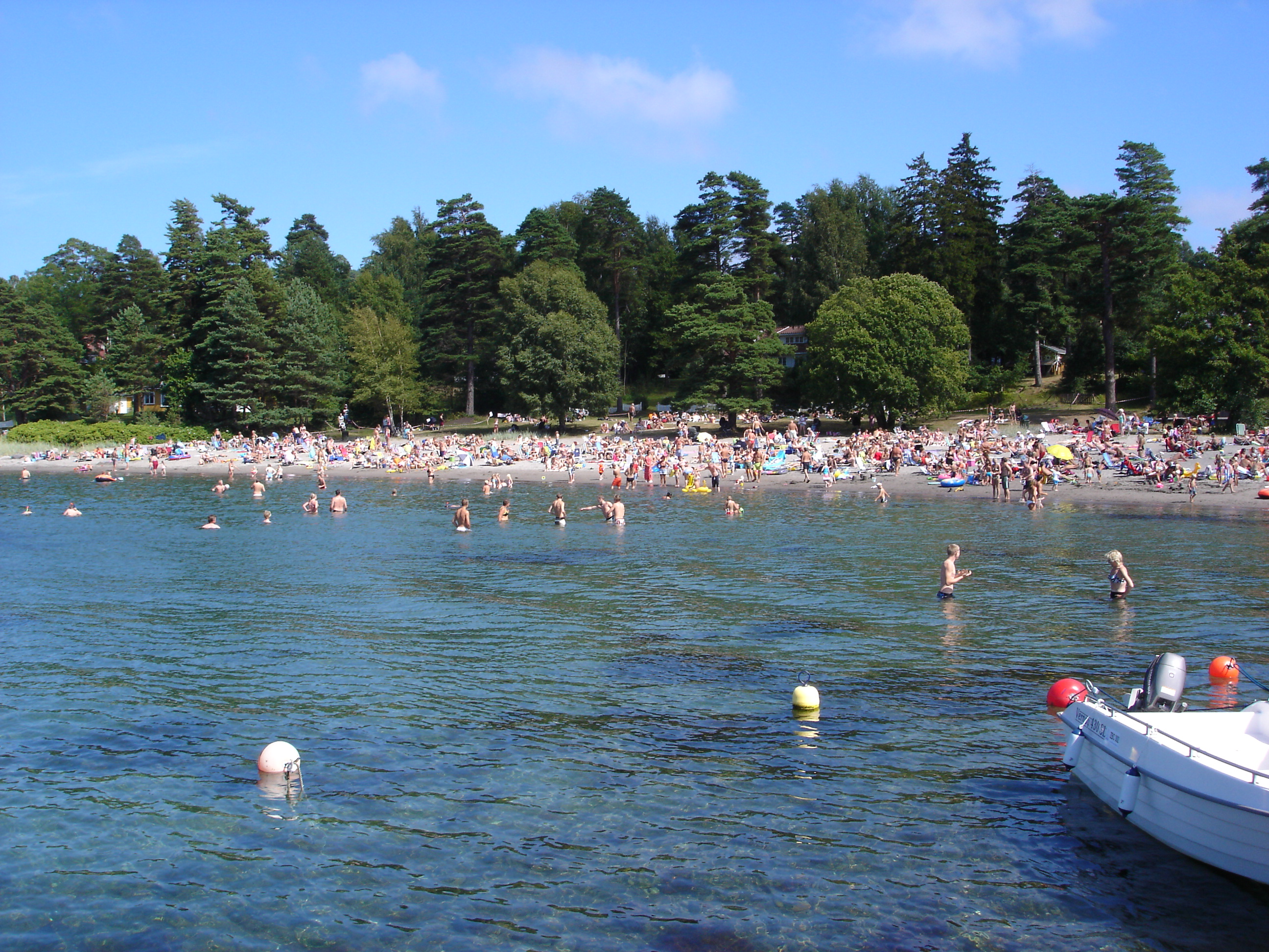 Vøra beach in Sandefjord